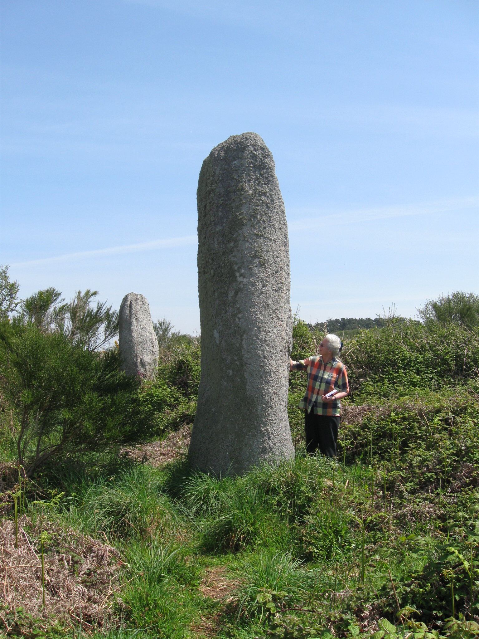 Menhire von Traonigou, Finistere